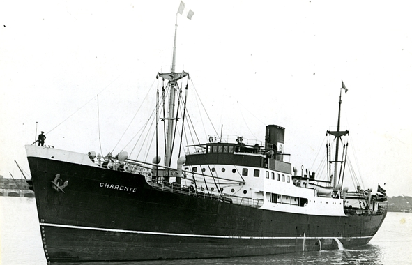 D/S Charente, bygget 1935 ved Porsgrunds mek. Verksted for Fearnley & Eger, Oslo)